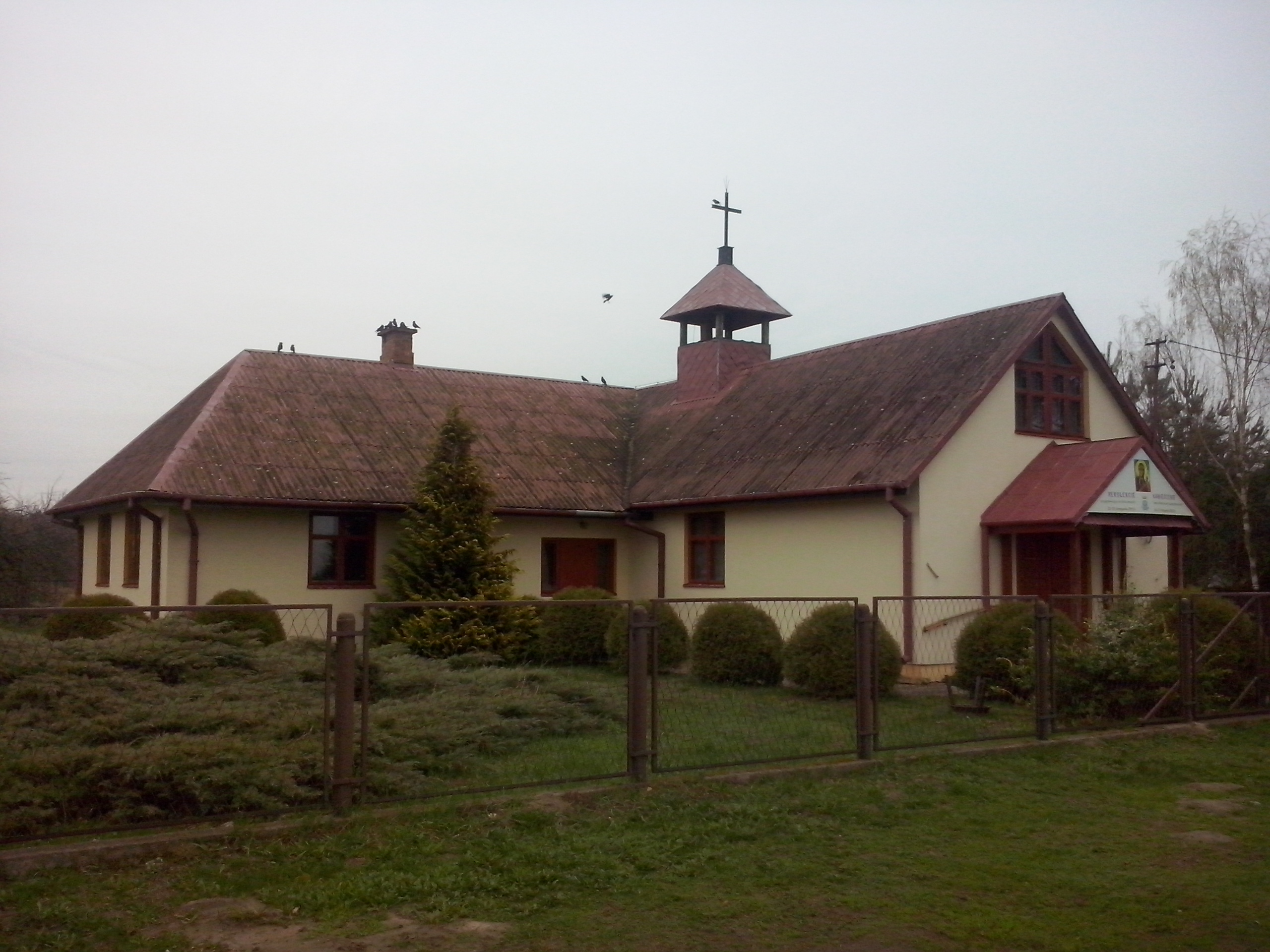 Wojszczyce (gm. Zakroczym, pow. Nowy Dwór Mazowiecki) - kaplica Św. Józefa